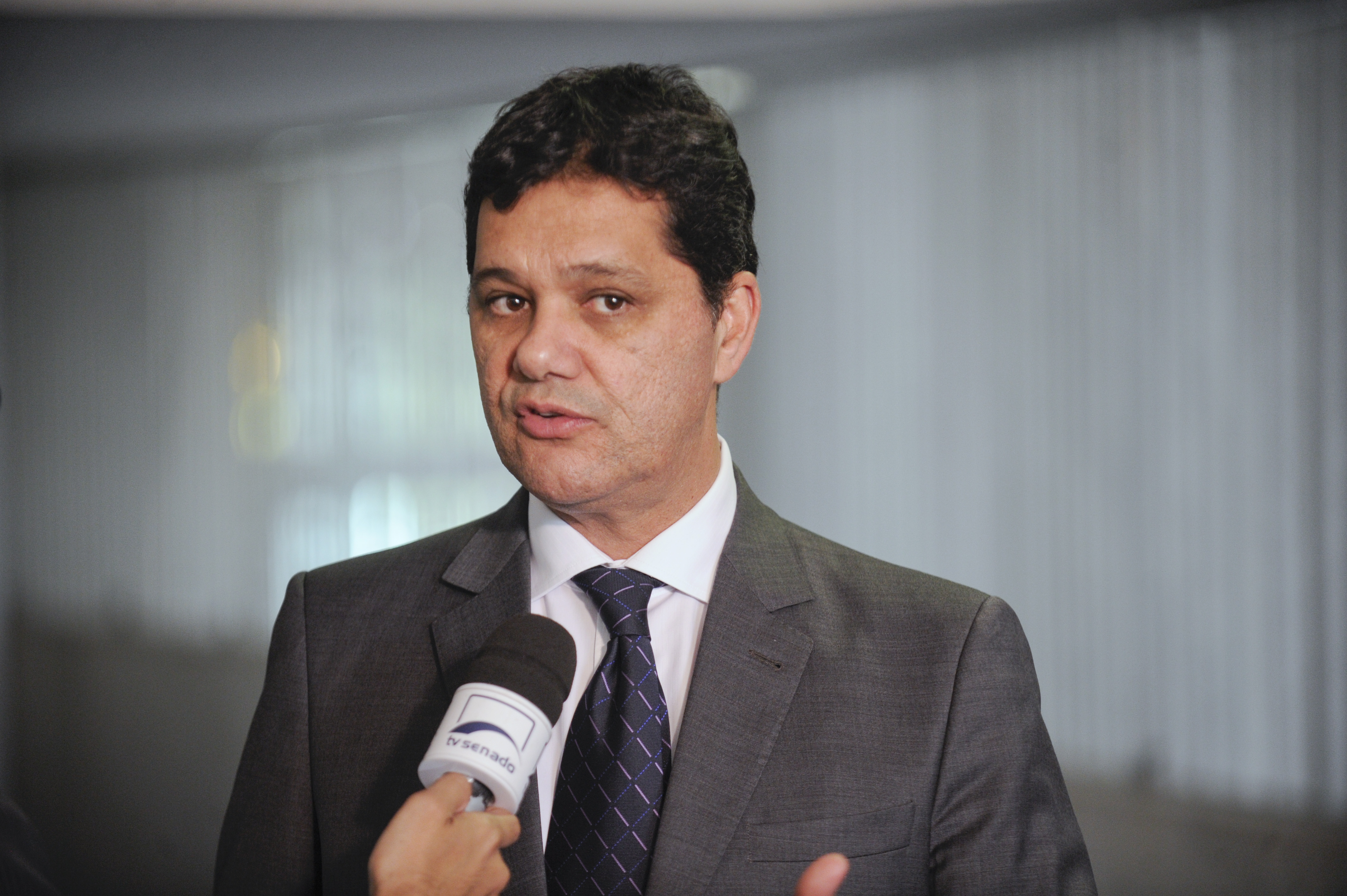 Ssenador Ricardo Ferraço (PMDB-ES) concede entrevista. Foto: Jefferson Rudy/Agência Senado